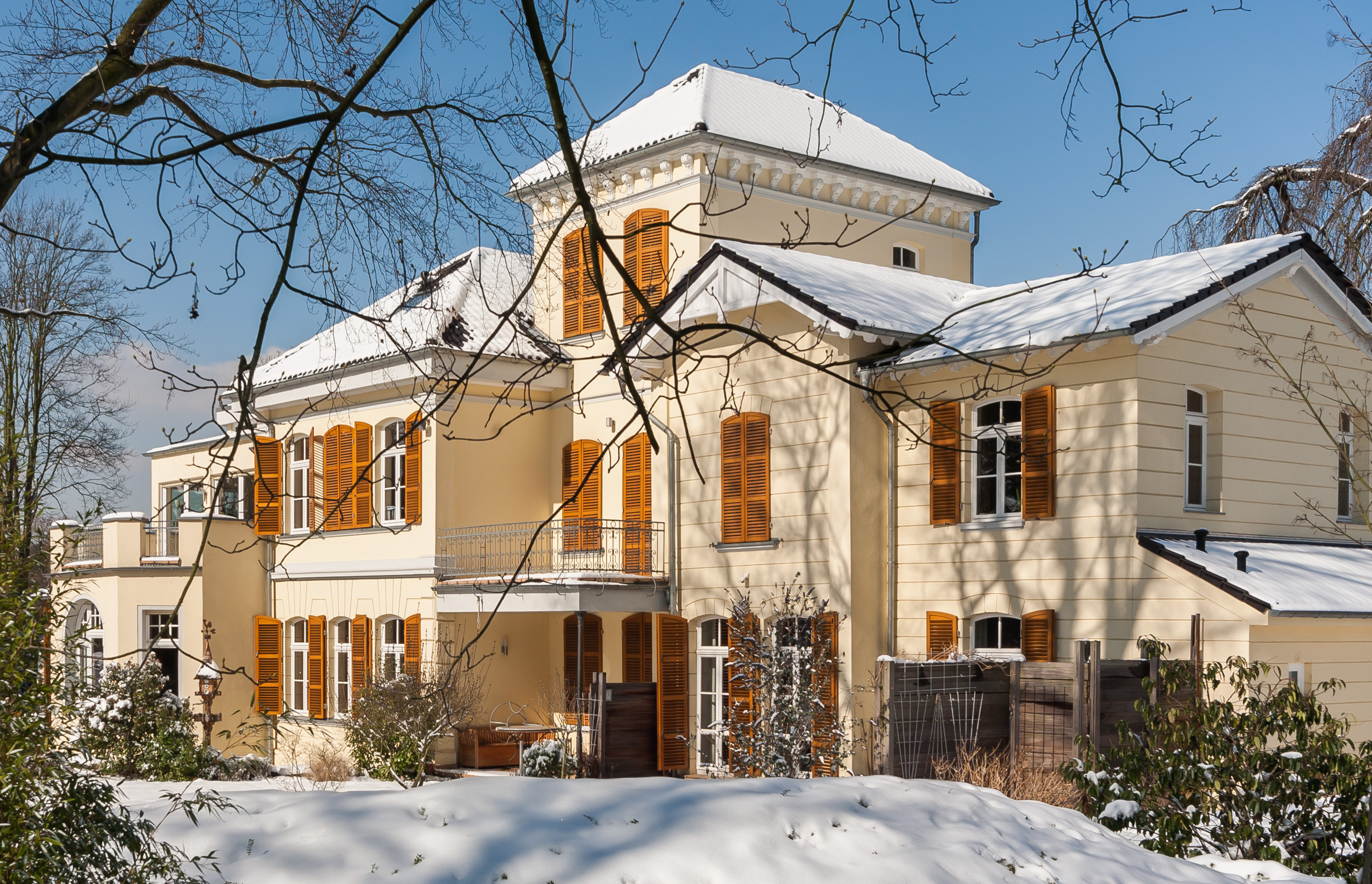 „Villa Rheinau“, Hauptstraße 204/204a am Südrand von Niederdollendorf, Königswinter, NRW, Deutschland